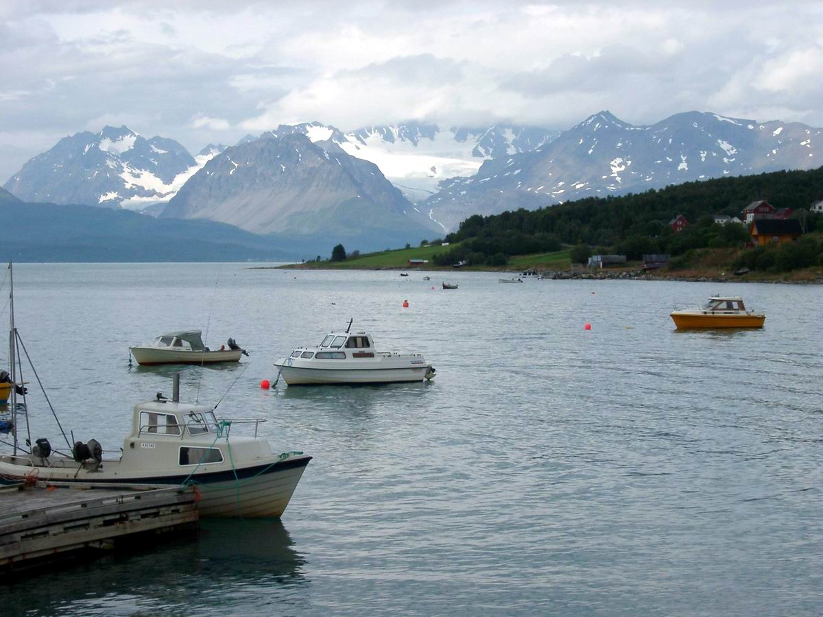 zwischen Alta & Narvik 3 Norwegen